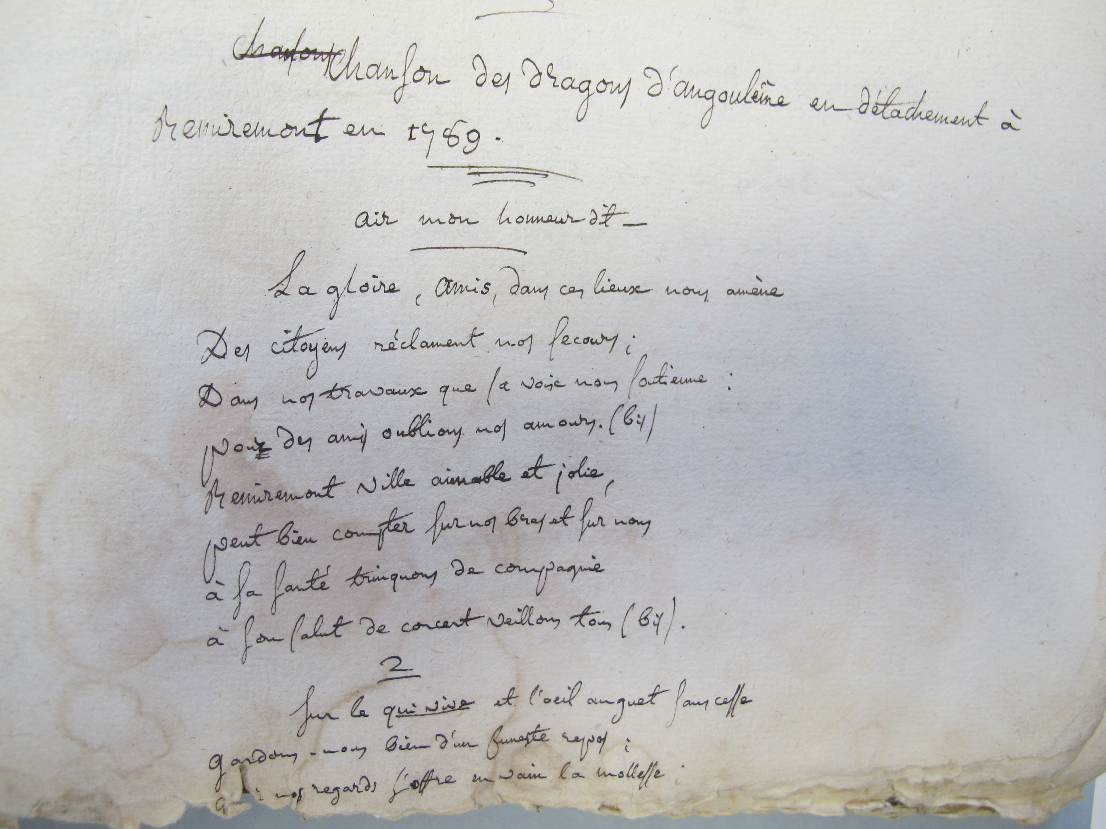 Manuscrit conservé aux Archives municipales de Remiremont, Cote : 4 S 3